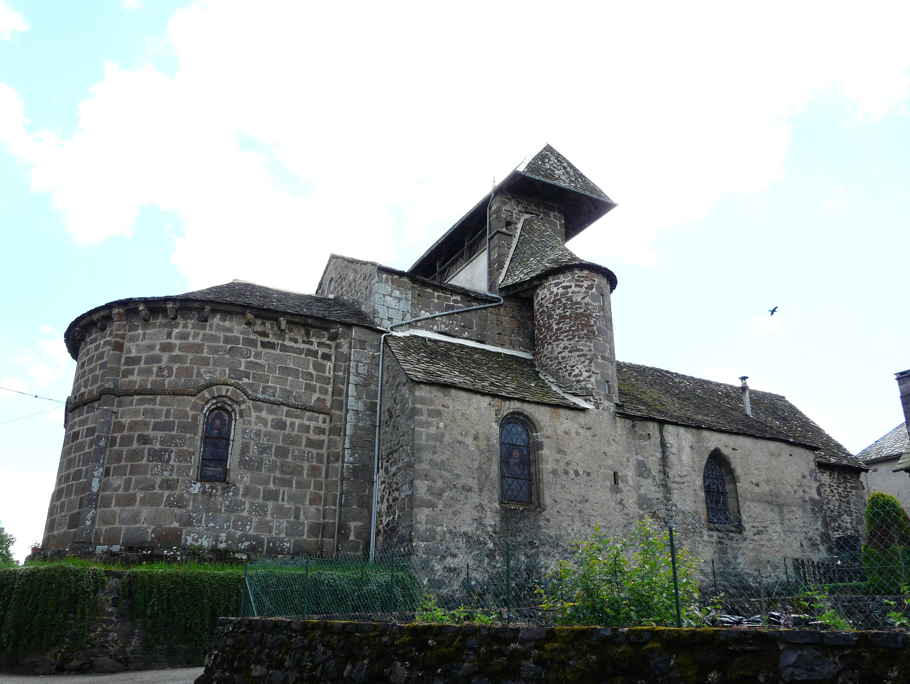 L'église de Saint-Bonnet-de-Salers, Cantal, France.